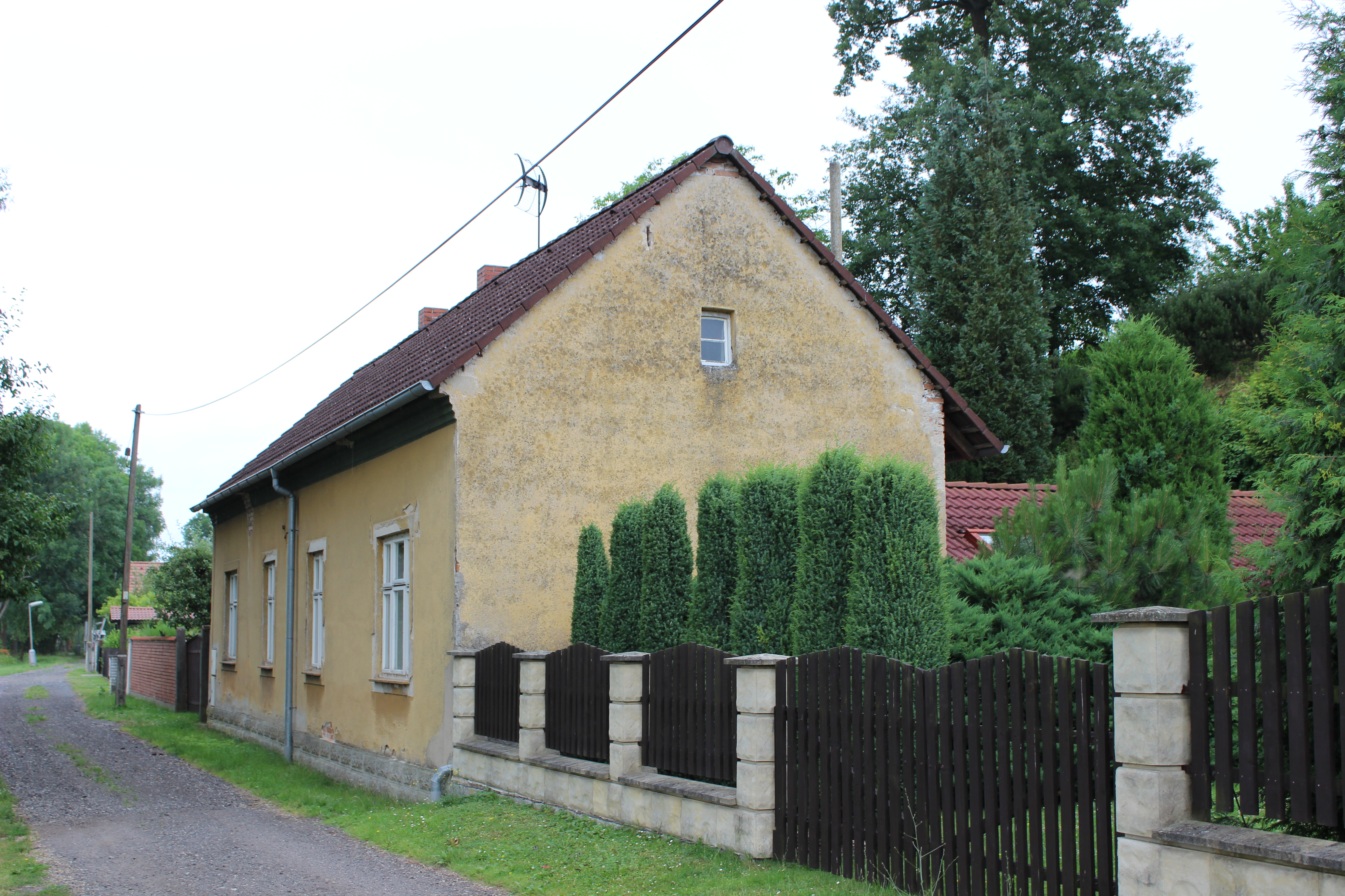 Dům číslo popisné 5 v Kačově, části Předměřic nad Jizerou (pohled od západu).